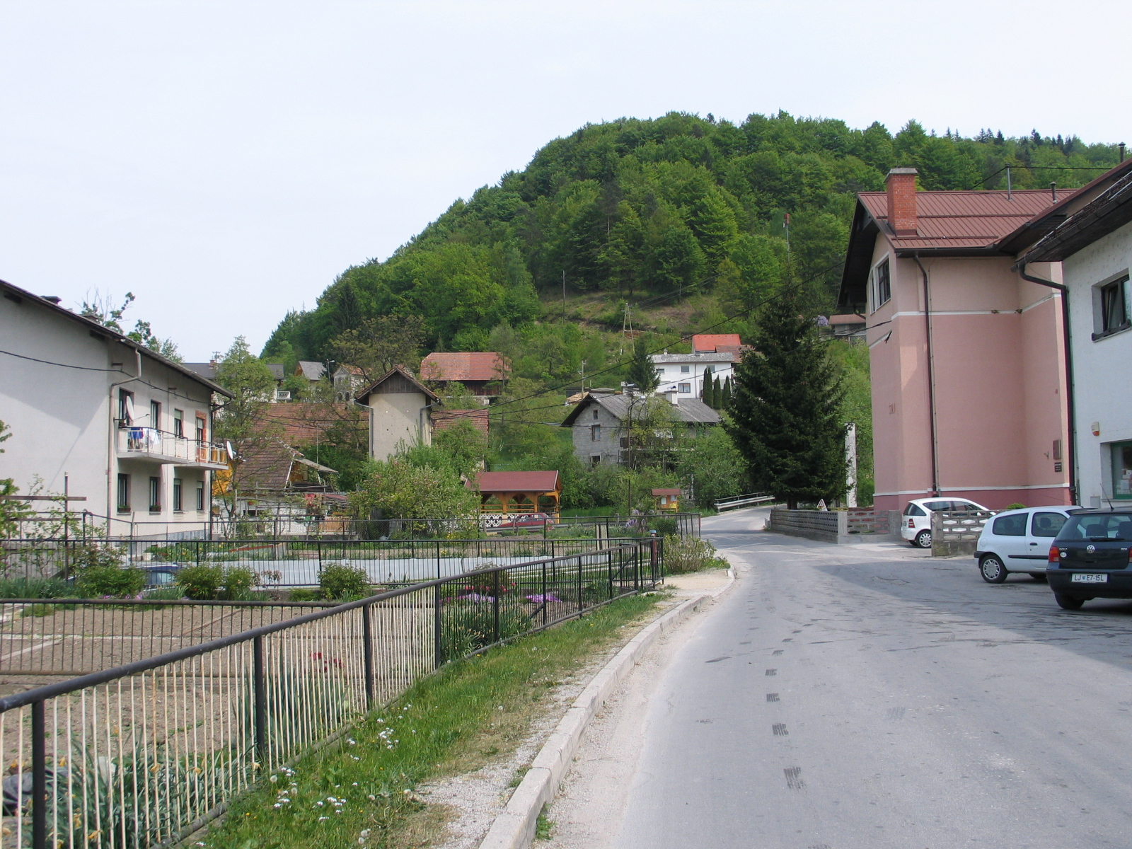 Jevnica, Slovenija.